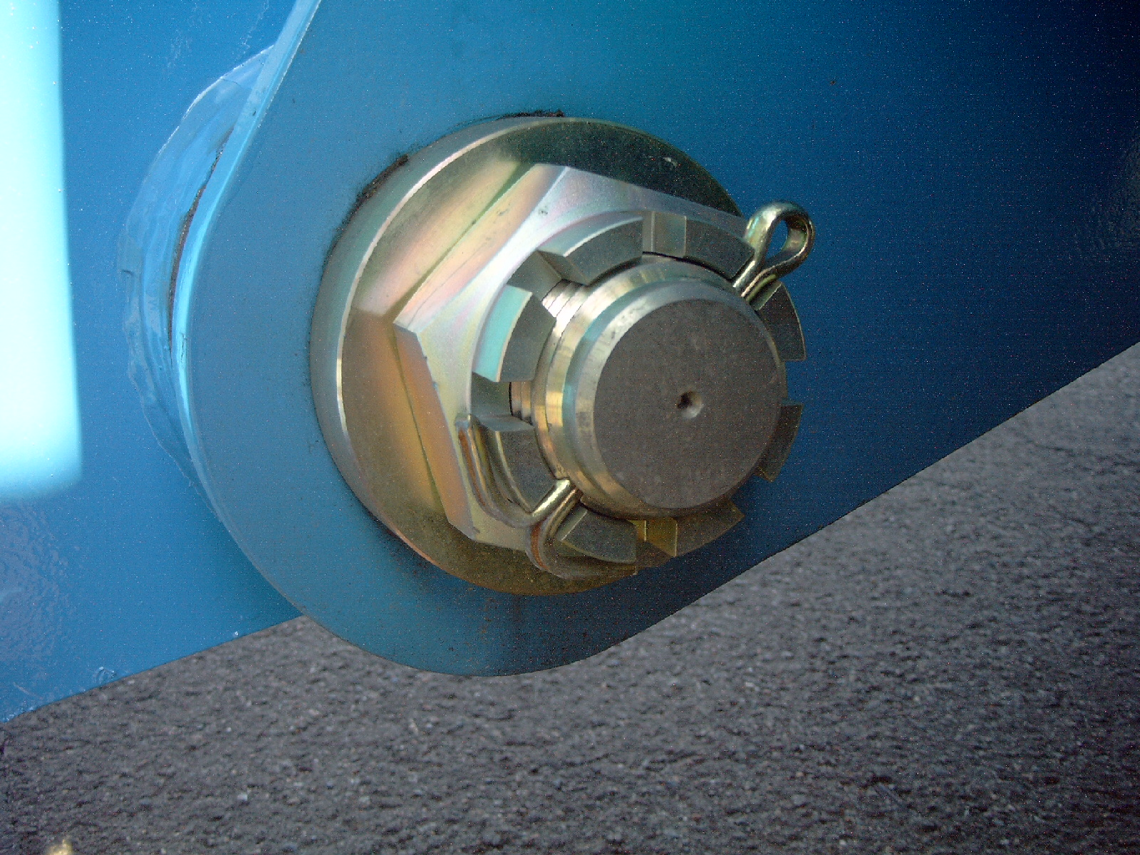 Splint in Kronenmutter. Splint am Stützfuß der Terex-Fuchs Lademaschine MHL 585